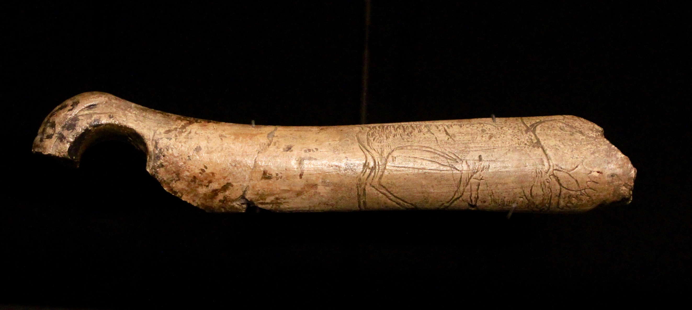 Lochstab mit Ren aus dem Kesslerloch (Kopie aus dem Landesmuseum Zürich, Original im Rosgartenmuseum Konstanz)